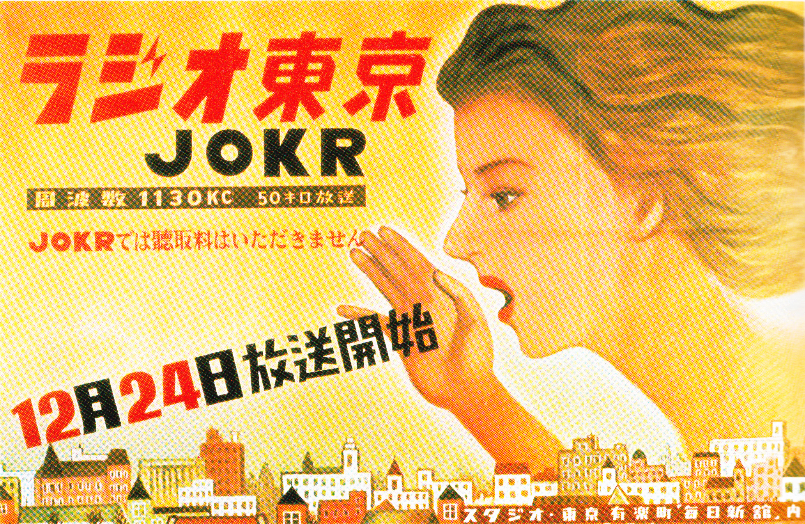 東京初の民間放送「ラジオ東京」の開局(1951-12-25)の告知